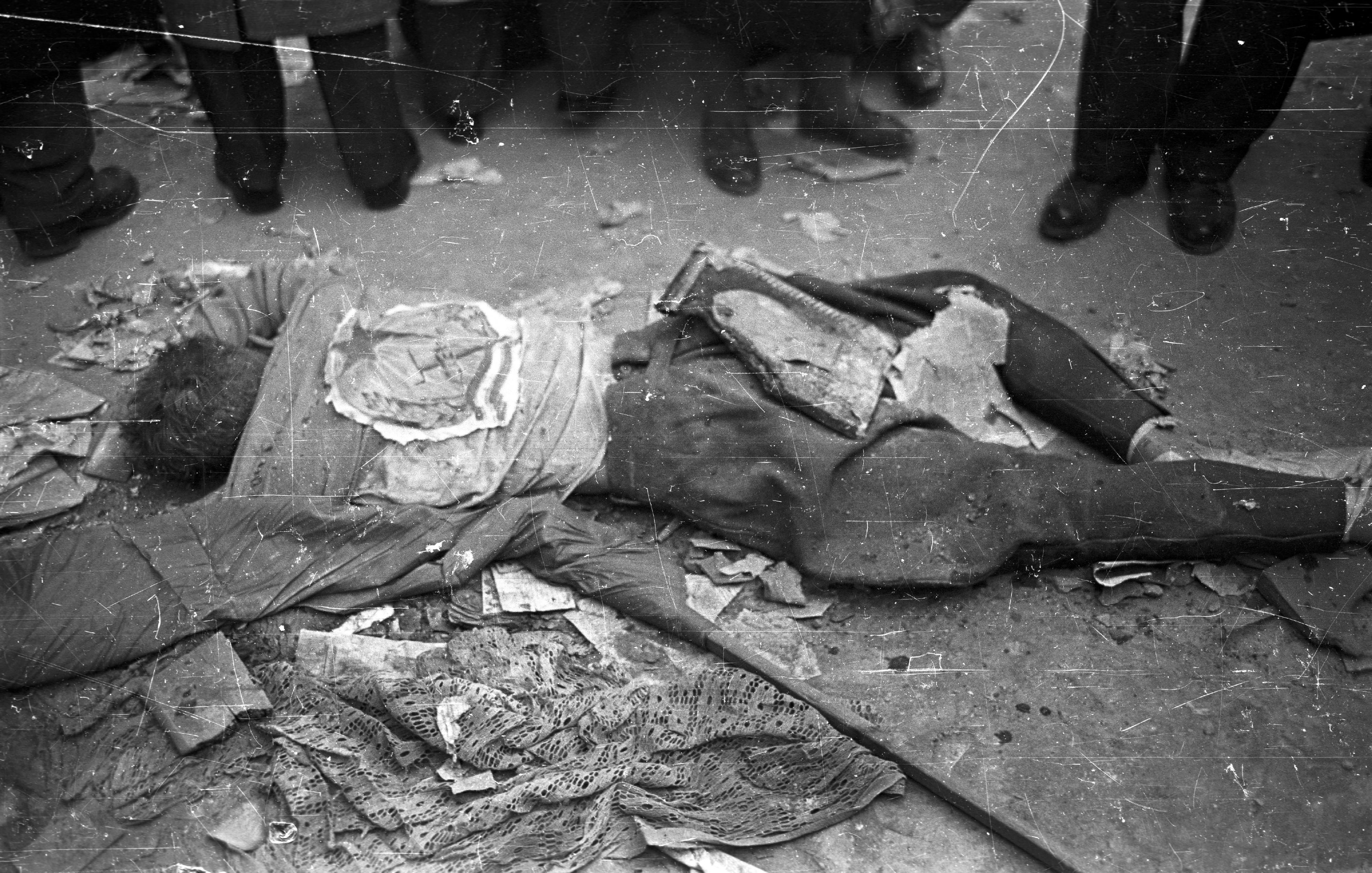 II. János Pál pápa (Köztársaság) tér, a pártház ostromakor kivégzett védő holtteste. Location: Hungary, Budapest VIII. Tags: crest, corpse, Budapest, revolution Title: II. János Pál pápa (Köztársaság) tér, a pártház ostromakor kivégzett védő holtteste.